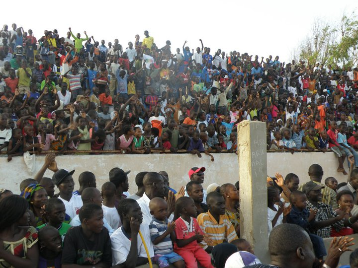 Population des Parcelles Assainies